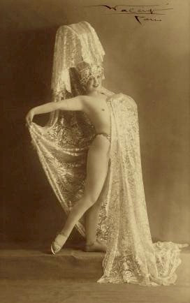 Folies Bergere Performer - Guna Mori